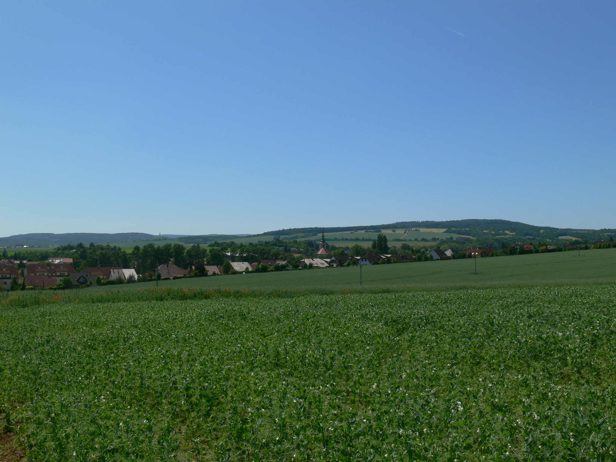 Dědice, A. B. Svojsíka